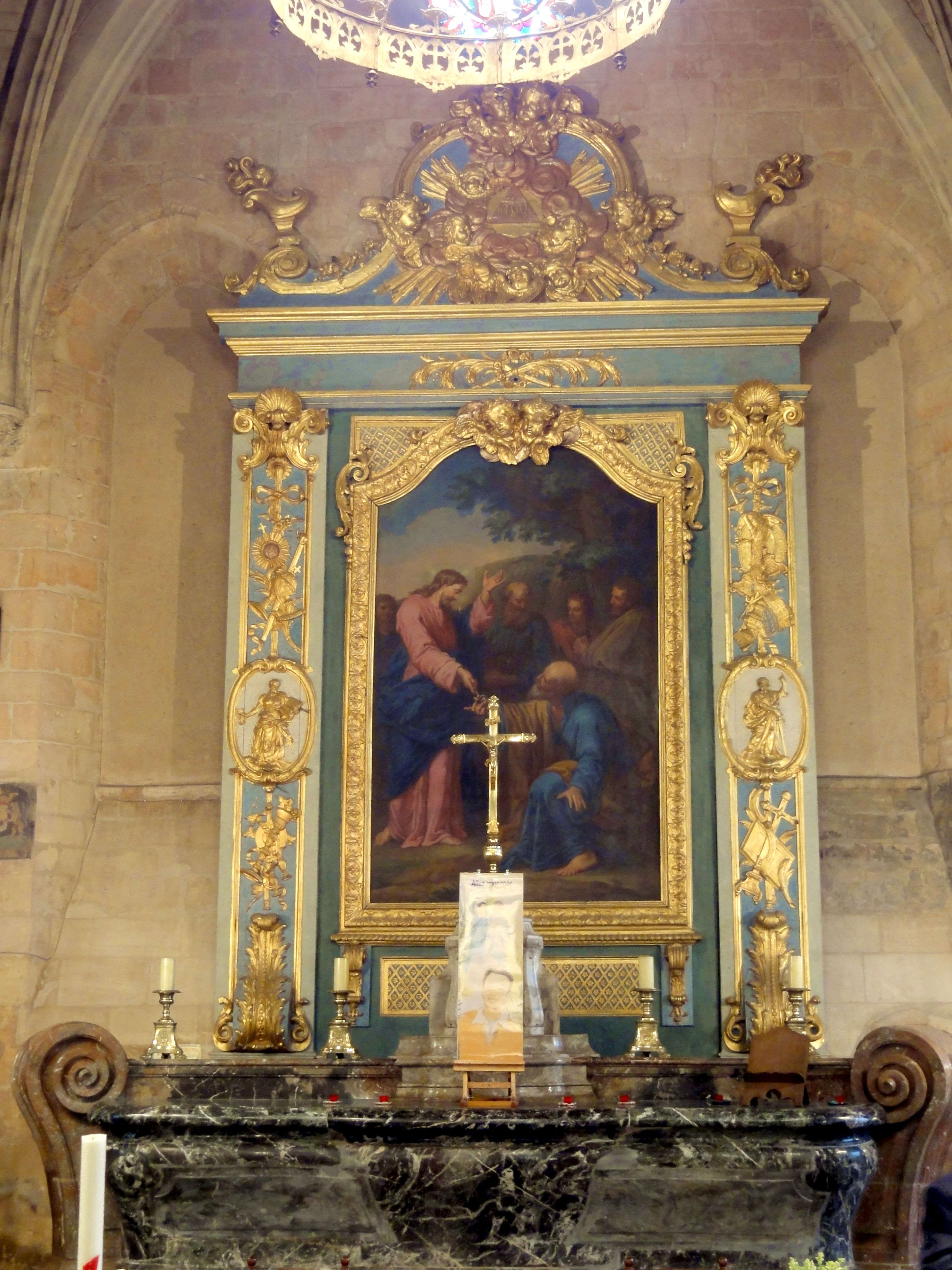 Retable du maître-autel.